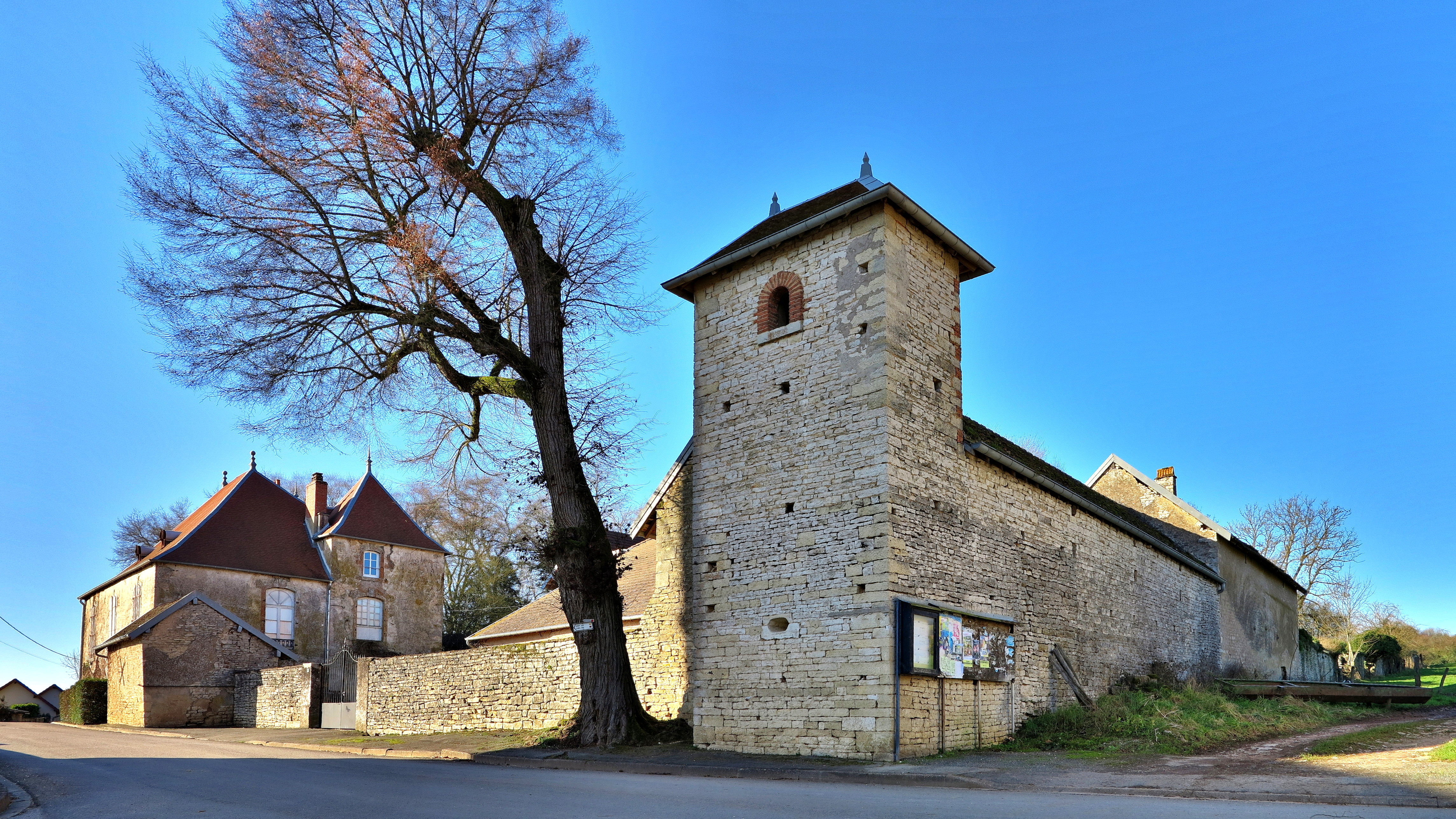 Le château et sa tour-pigeonnier